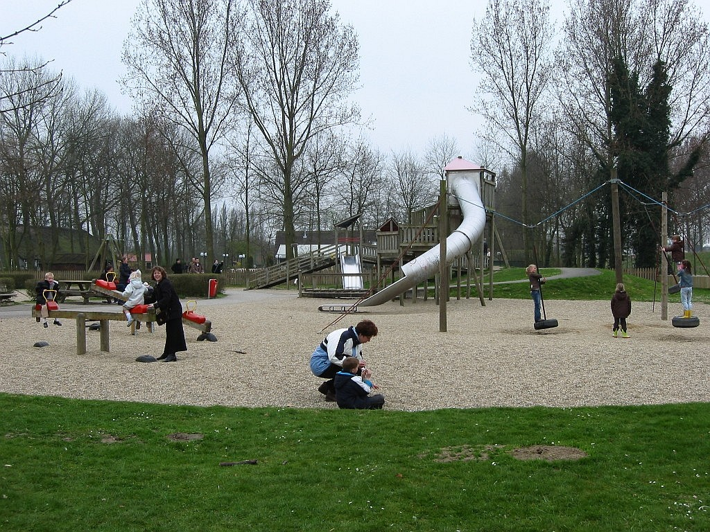 een speeltuin, Hollandsche Hoeve, Goes